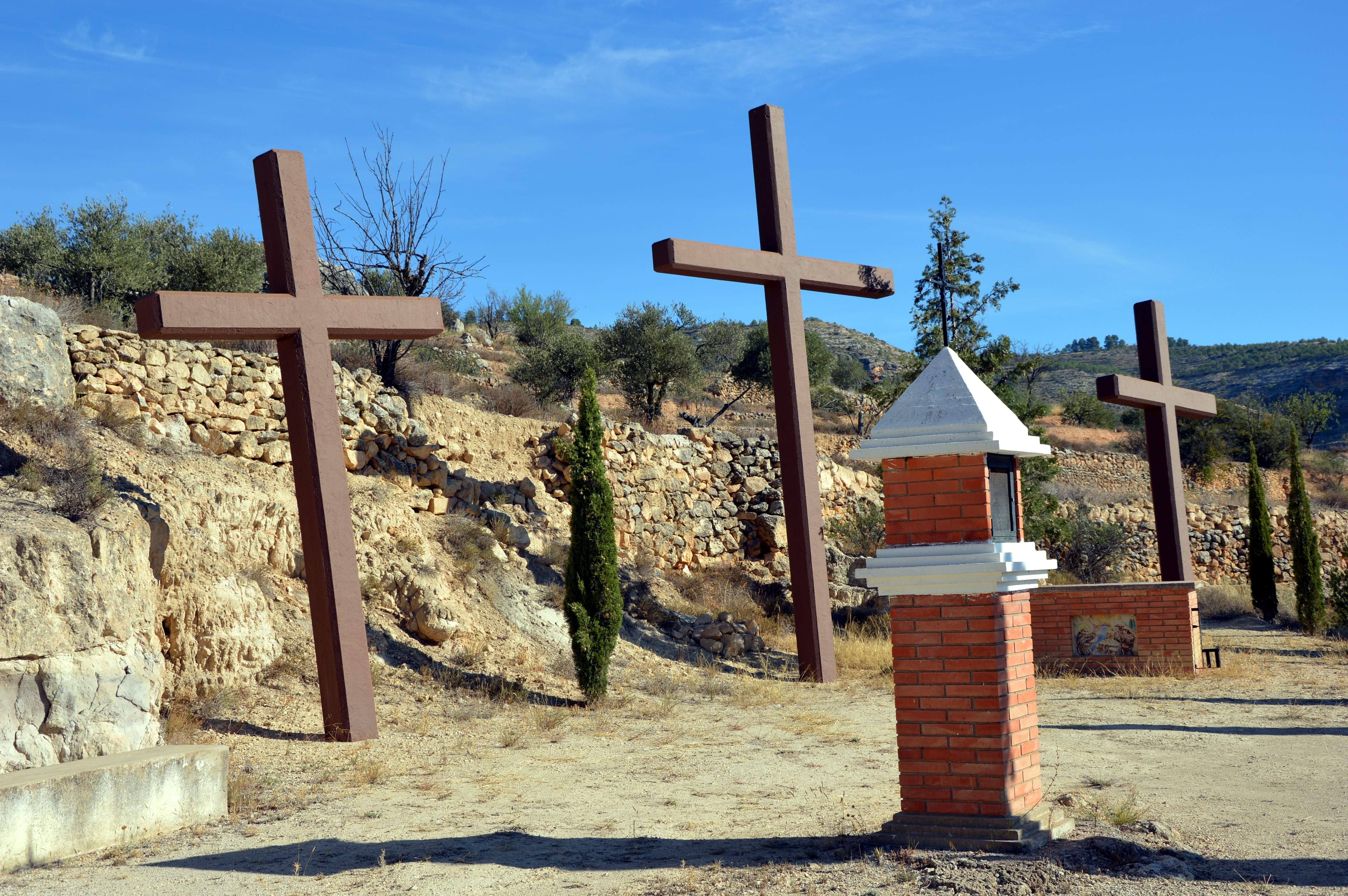 Detalle del final del Vía Crucis de Casasaltas (Valencia).